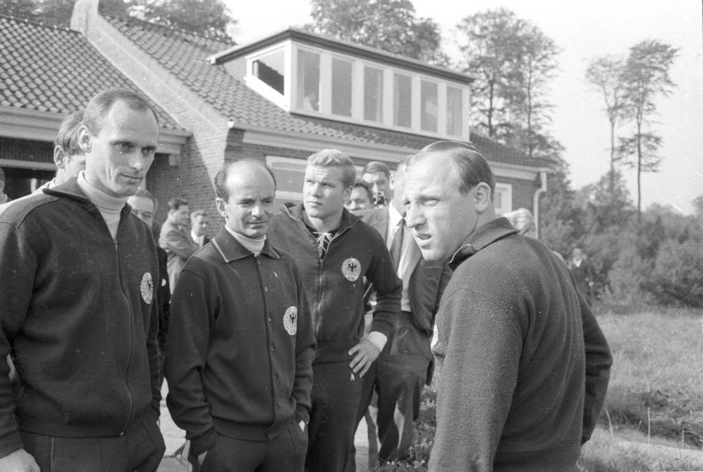 Im Bild v.l.n.r.: Willi Schulz, Trainer Dettmar Cramer, Klaus-Dieter Sieloff, Uwe Seeler.